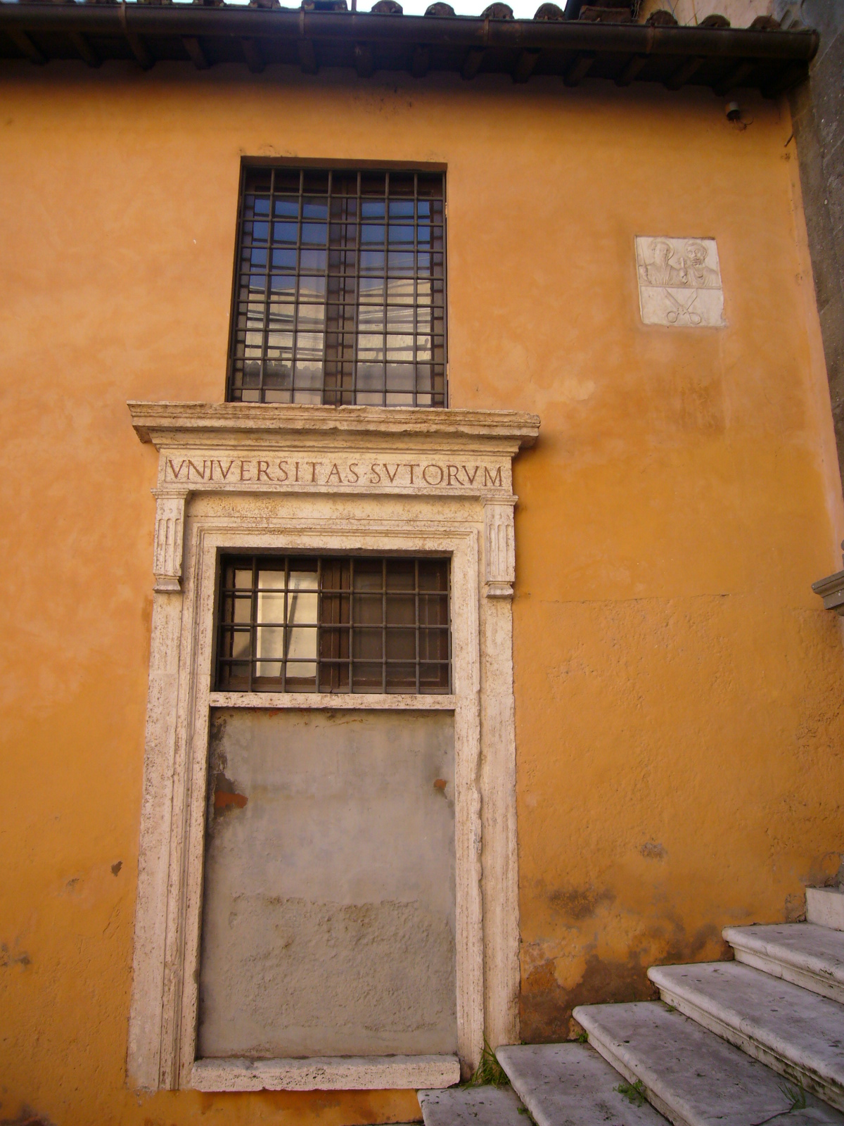 Roma, Campidoglio: Universitas Sutorum (Corporazione dei calzolai)